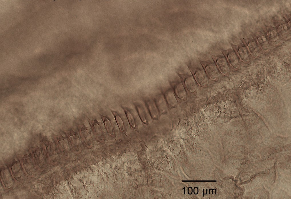 Mikroskopische Aufnahme der Schrillzähne auf der Schrillleiste des rechten Vorderflügels bei einem frisch geschlüpften Männchen.